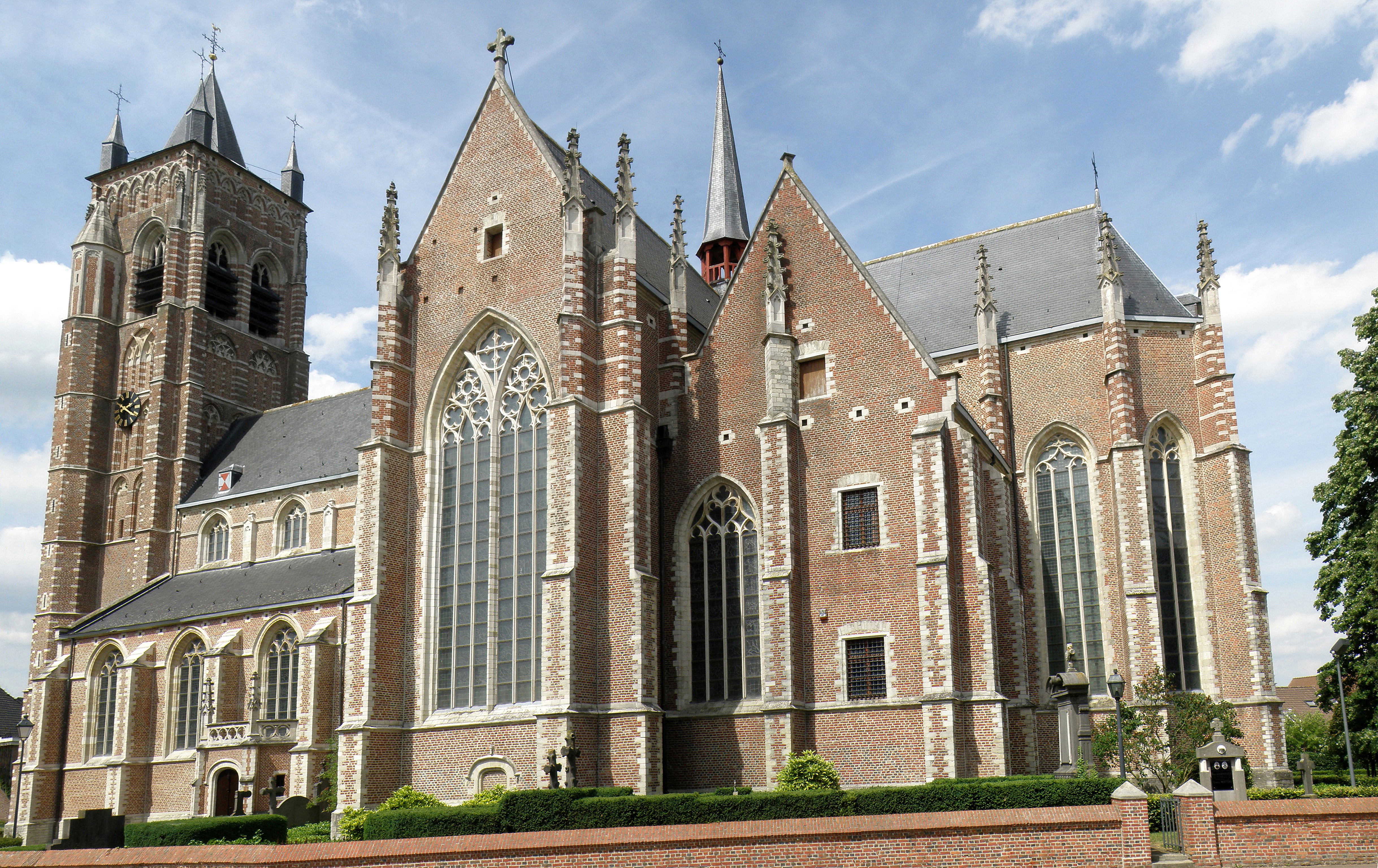 Sint-Lenaarts, deelgem. van Brecht (provincie Antwerpen, België). Sint-Leonarduskerk.